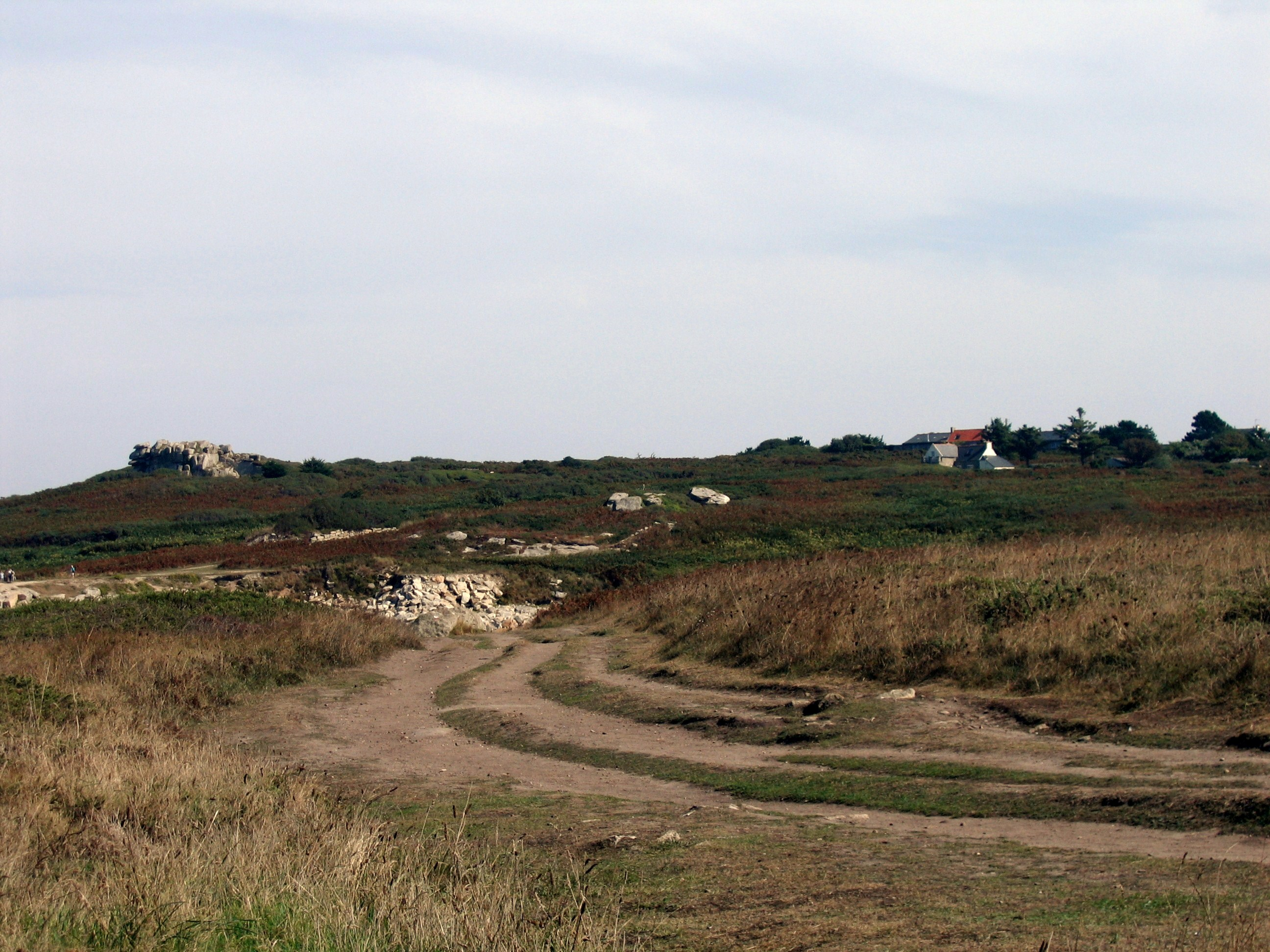 Vestiges du poste de garde-côte (Ti Gwerd) Île-Grande quartier de Pleumeur-Bodou dans les Côtes-d'Armor Bretagne